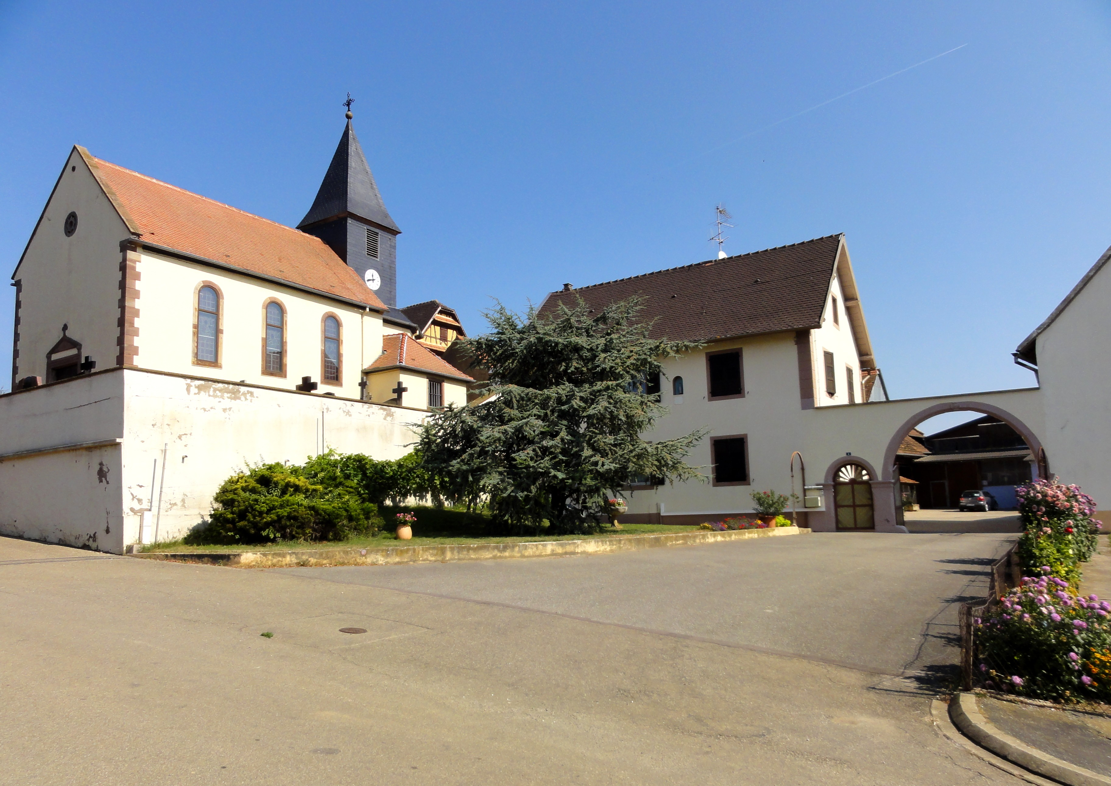 Alsace, Bas-Rhin, Woellenheim, Église Saint-André (IA67006306).